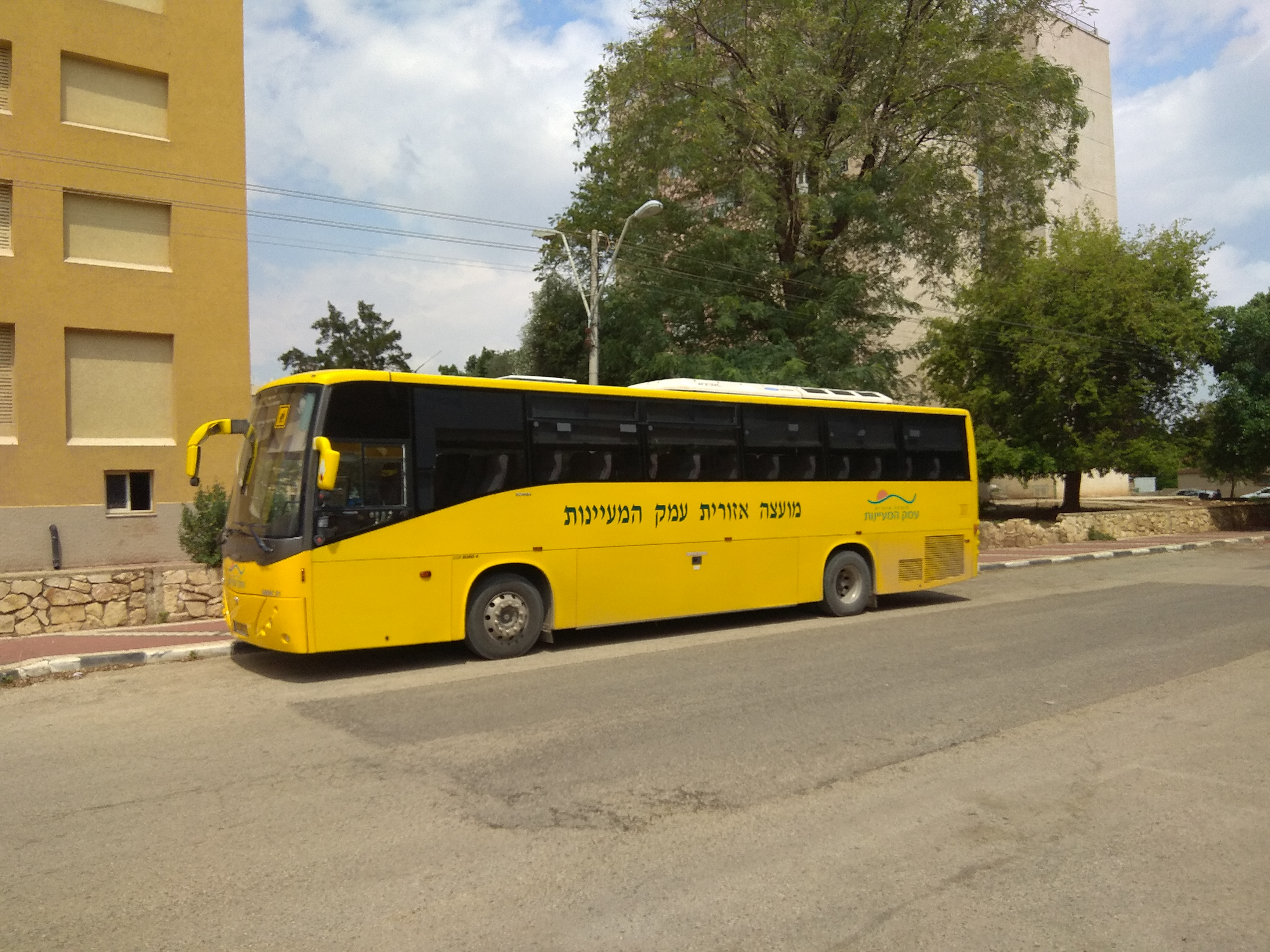 אוטובוס צהוב של המועצה האזורית